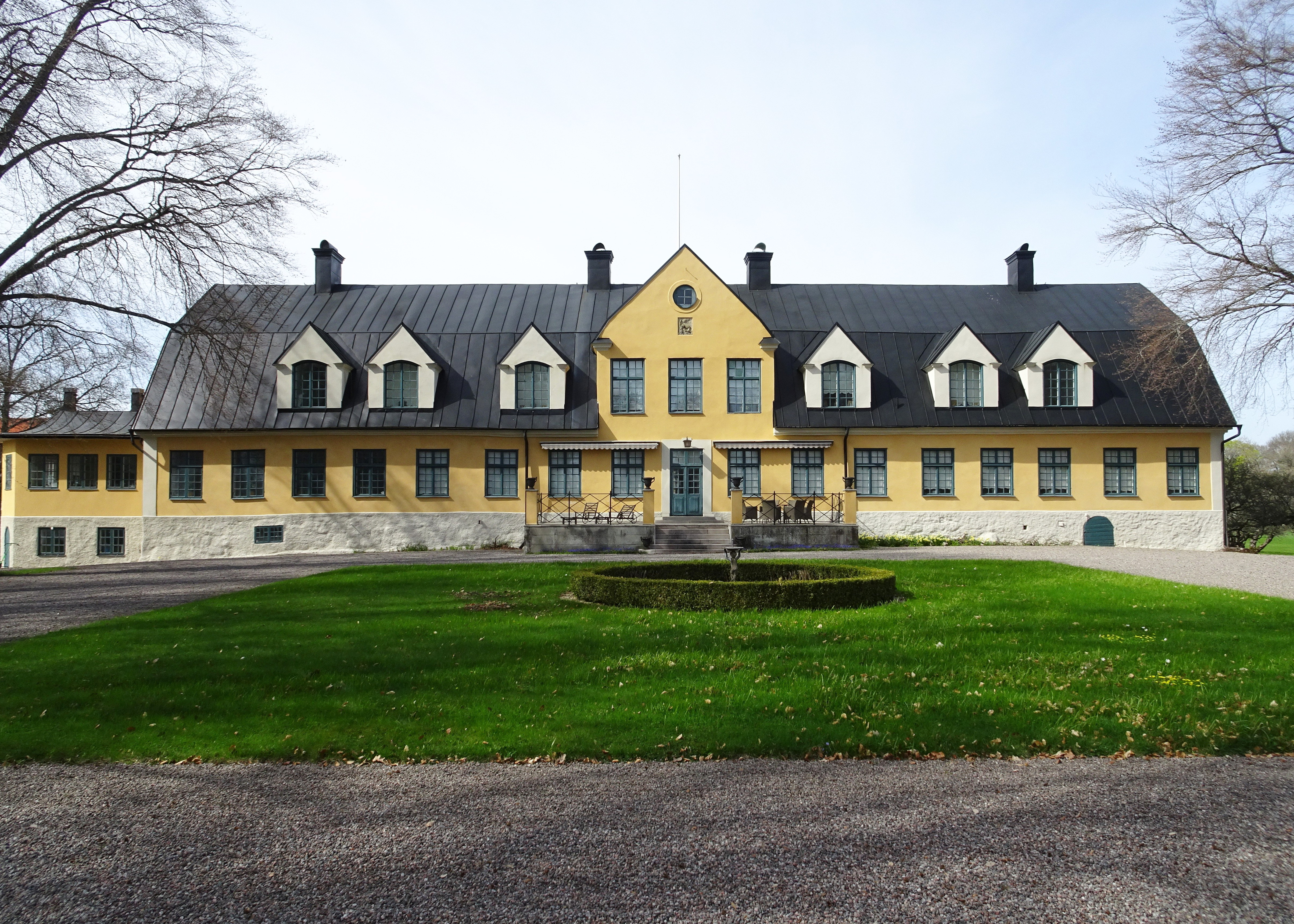 Säby gård, Aspö, fasad mot norr